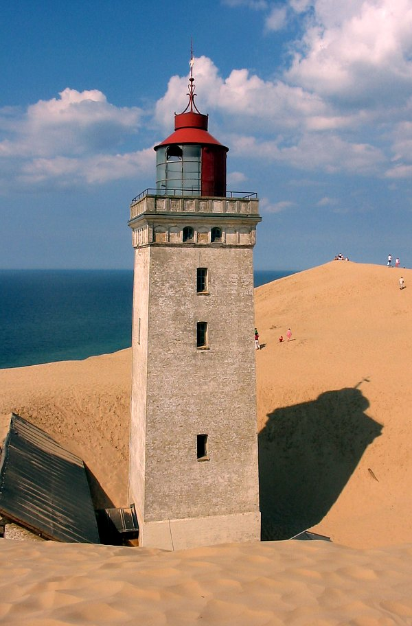 Rubjerg Knude